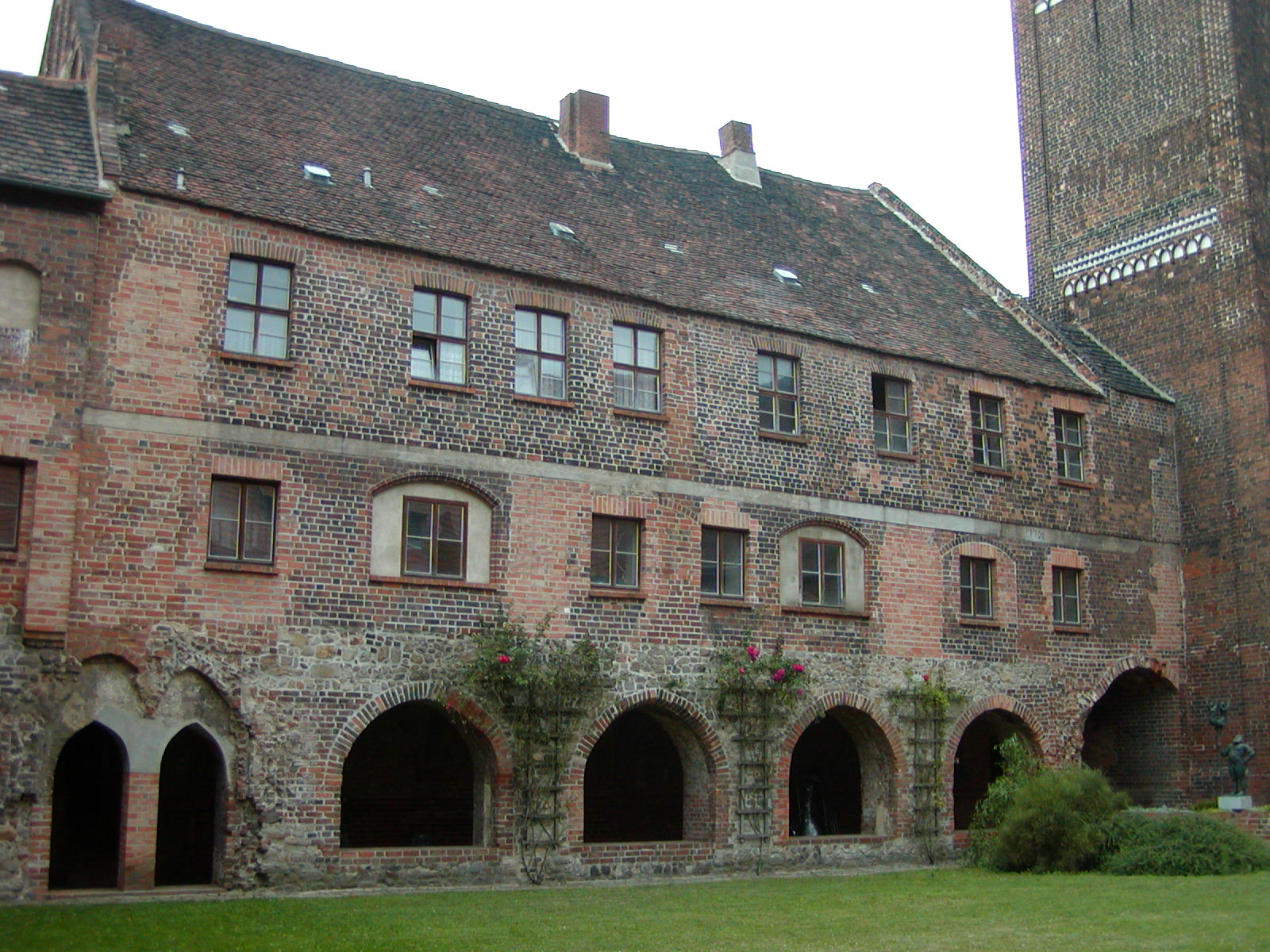 Kreuzgang